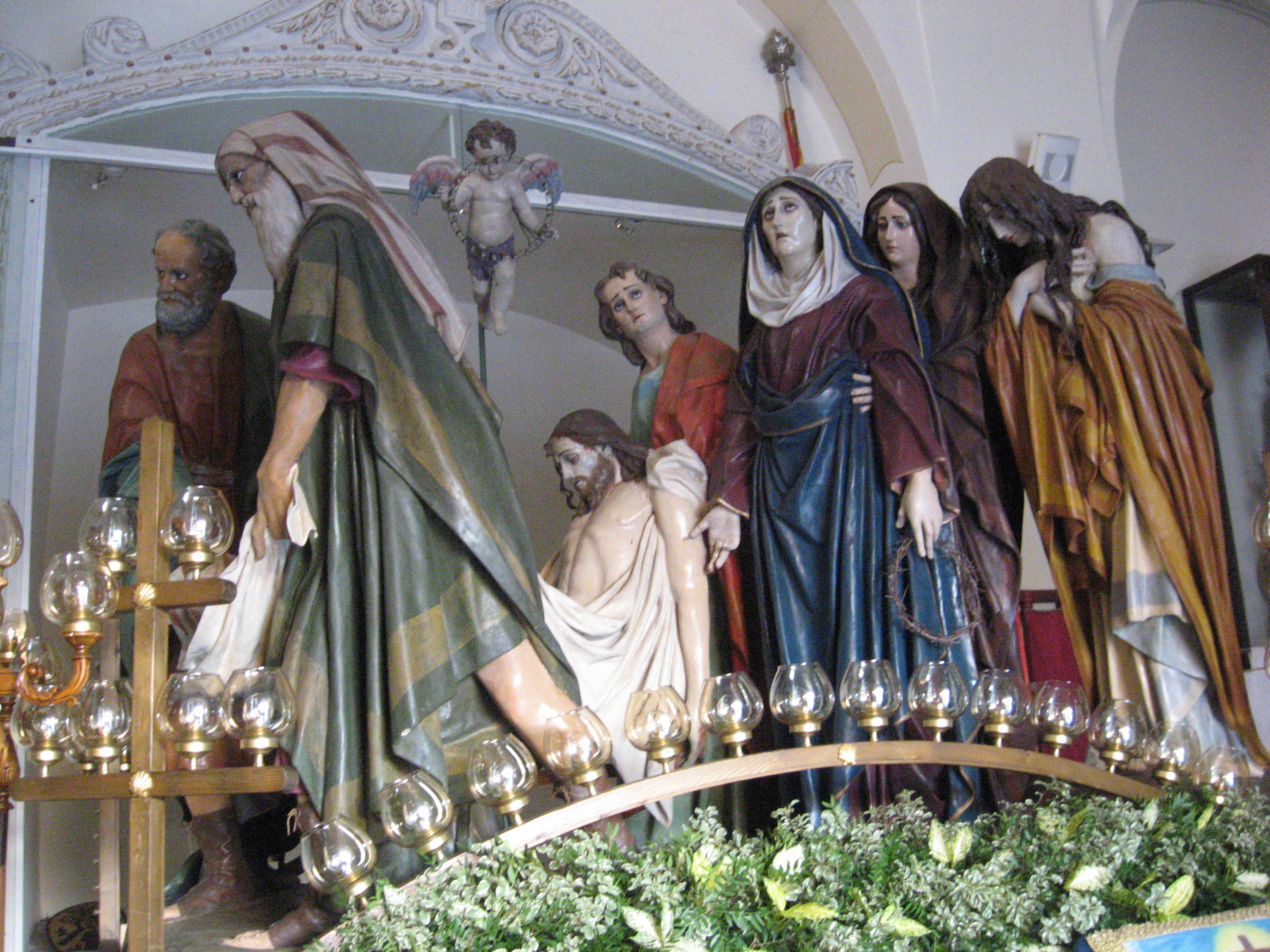 Otto Santi ruvo di puglia 2012